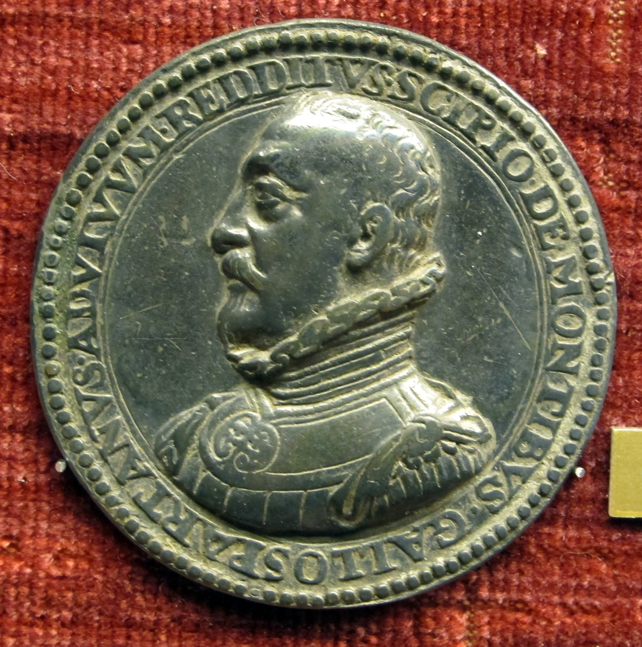 medaglia, vedi titolo